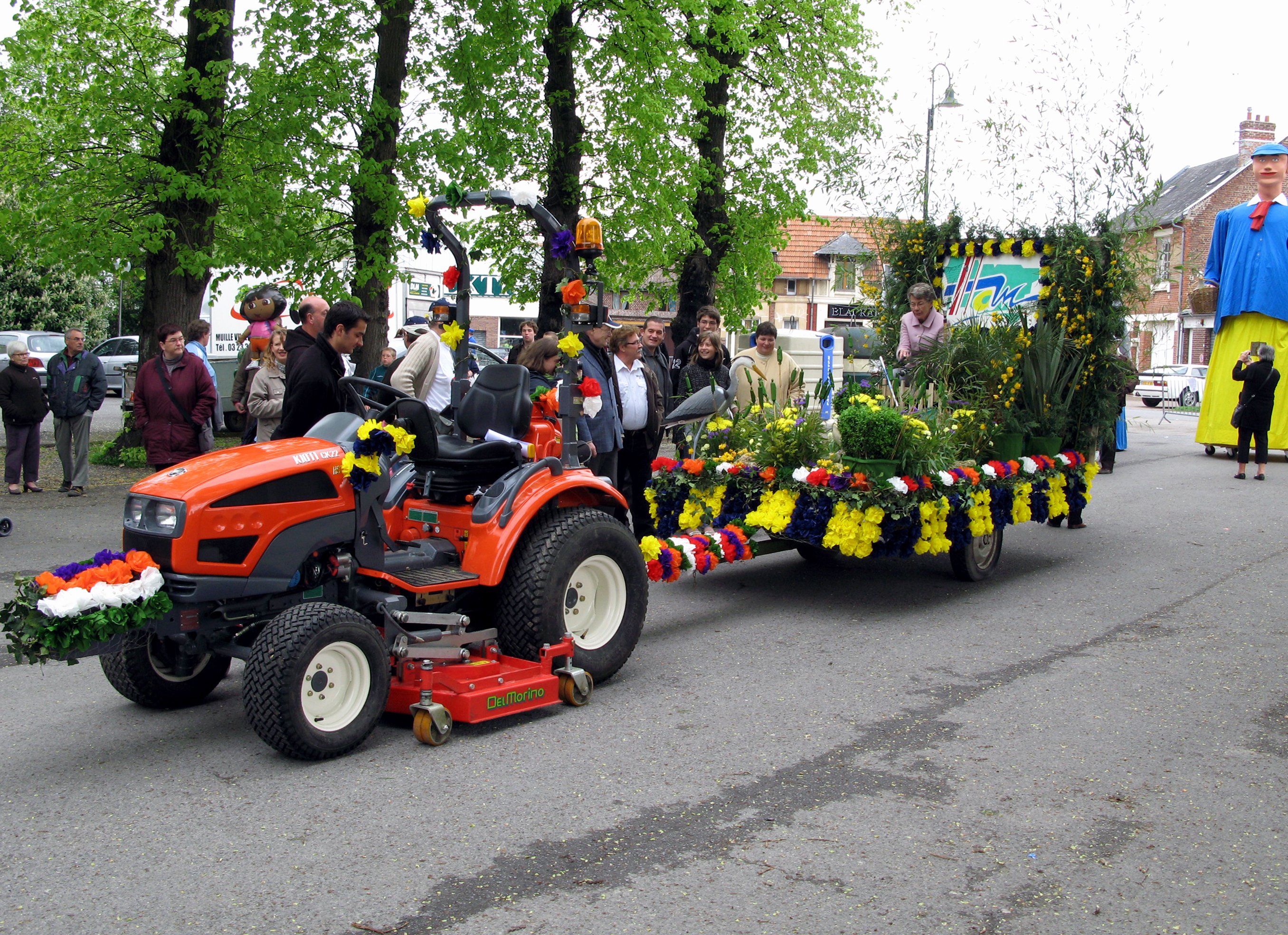 Ham (Somme, France) - Animation festive au centre-ville, un dimanche de printemps. Derrière l'Office de Tourisme (non loin des vestiges du Château). Avant la parade, vers 14 heures, les géants de procession sont assemblés, costumés et regroupés pour être alignés. Le char de la ville de Ham est positionné pour le départ. On voit aussi, tout à droite, « Tchout Jaques ».